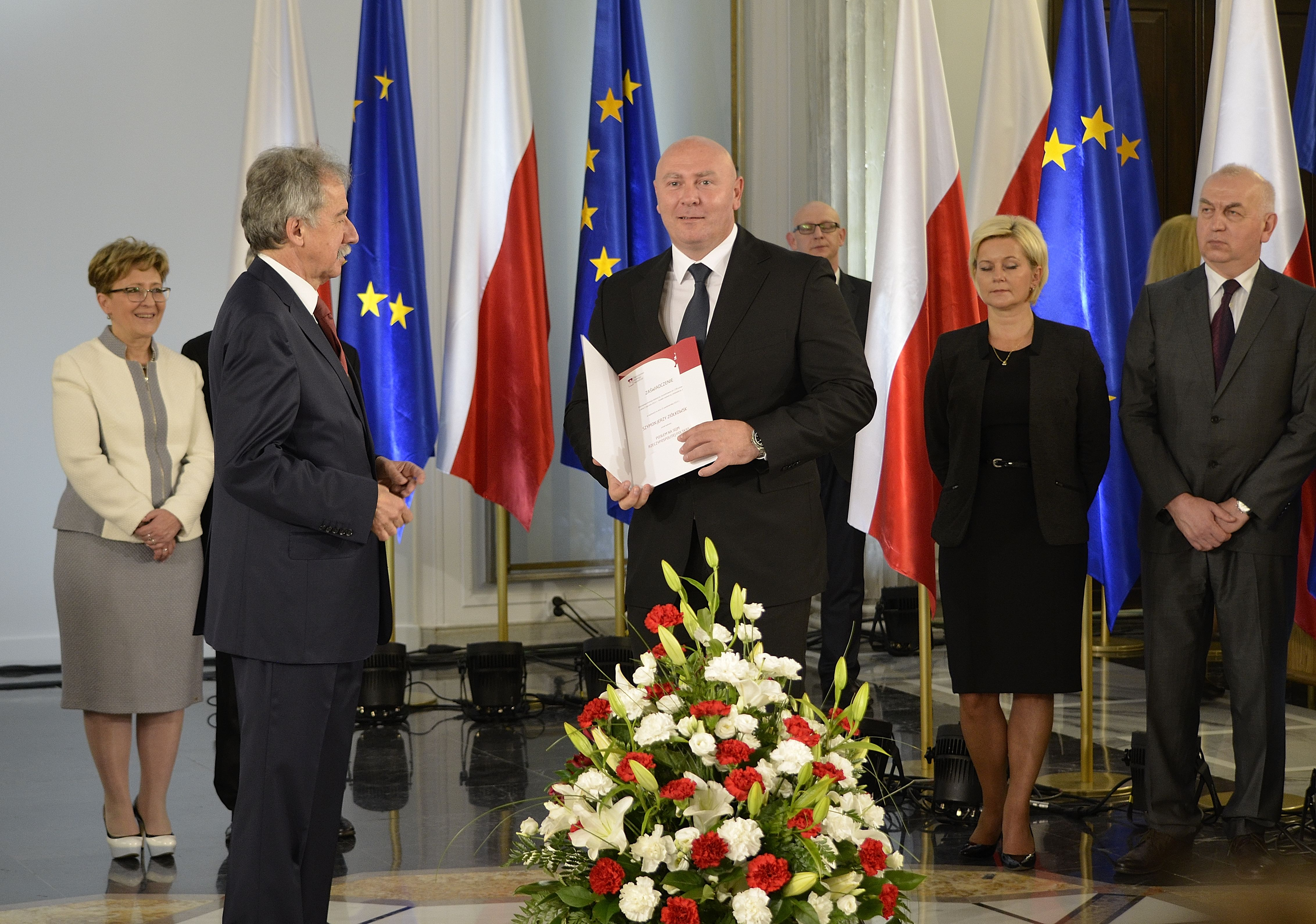 Poseł Szymon Ziółkowski podczas uroczystości wręczenia zaświadczeń o wyborze nowo wybranym posłom w Sali Kolumnowej Sejmu